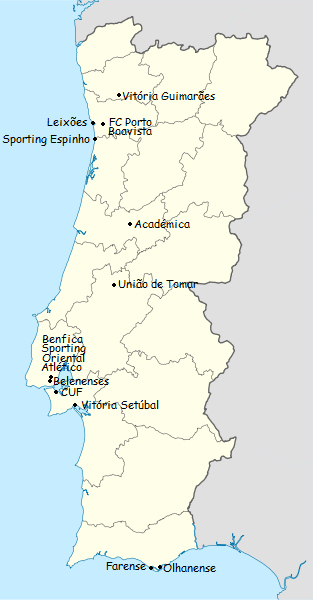 Carta dos clubes participantes do campeonato de portugal de futebol de primeira divisao 1974-1975